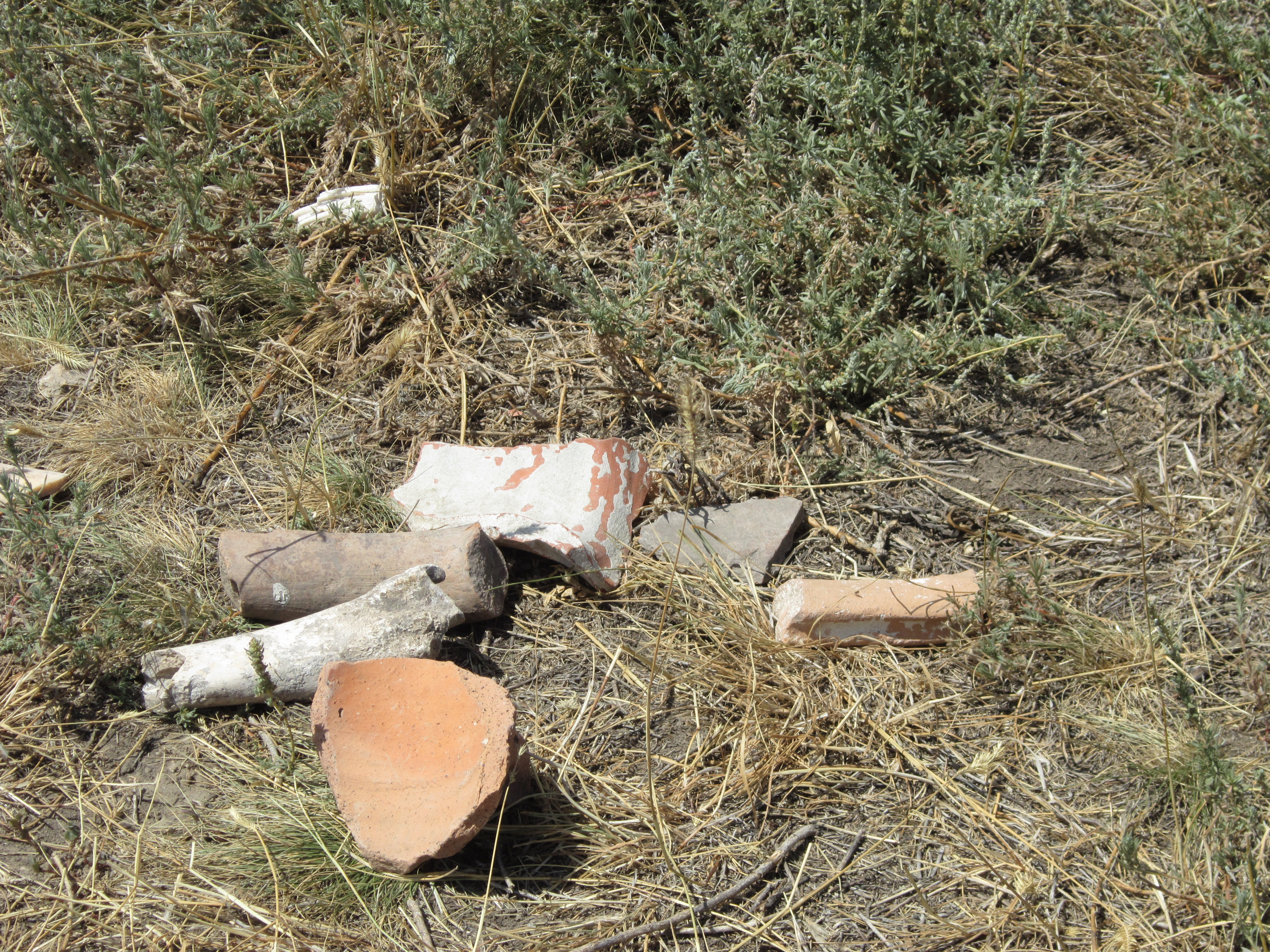 Античне місто Ніконій, село Роксолани, Овідіопольський район, Одеська область